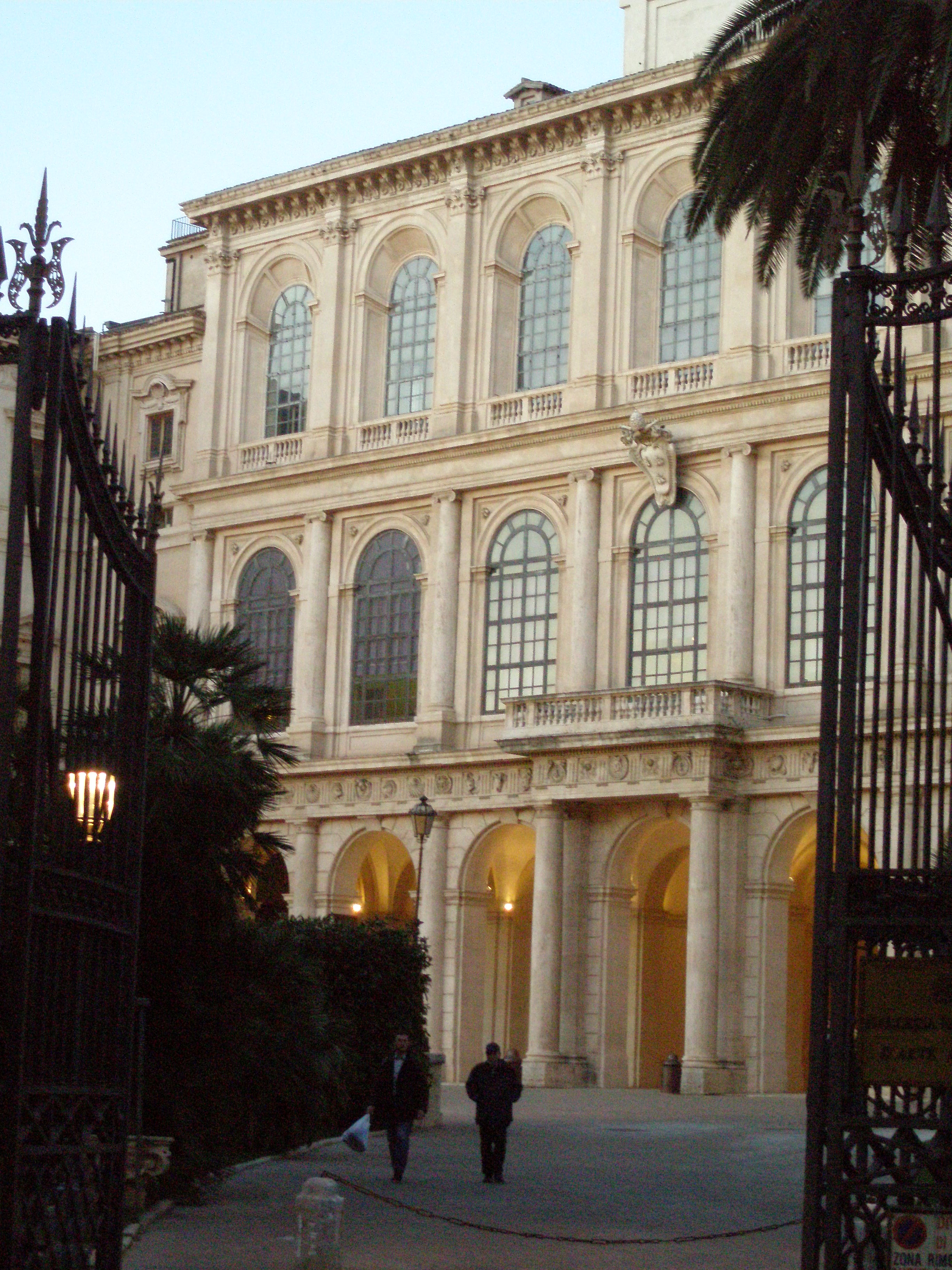 Palazzo Barberini a Roma, di Carlo Maderno, Gian Lorenzo Bernini e Francesco Borromini, Roma, dal 1625